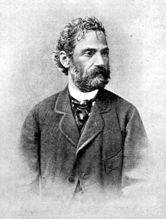 Gajzágó Salamon (1830–1898) politikus, a képviselőház alelnöke, az Állami Számvevőszék (akkor: Magyar Királyi Legfőbb Állami Számvevőszék) első elnöke portréja. Ellinger Ede fényképfelvétele